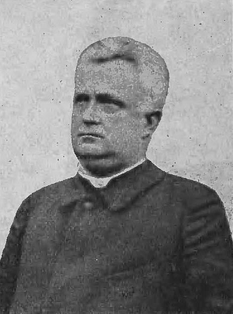 Wasyl Dawydiak (-1907)